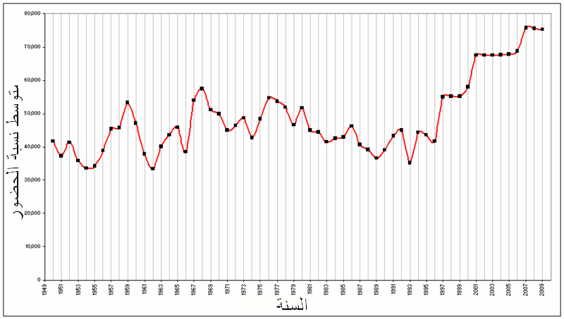 رسم بياني يُظهر متوسط نسبة الحضور في ملعب أولد ترافورد خلال الفترة الممتدة من عام 1949 حتى عام 2008.